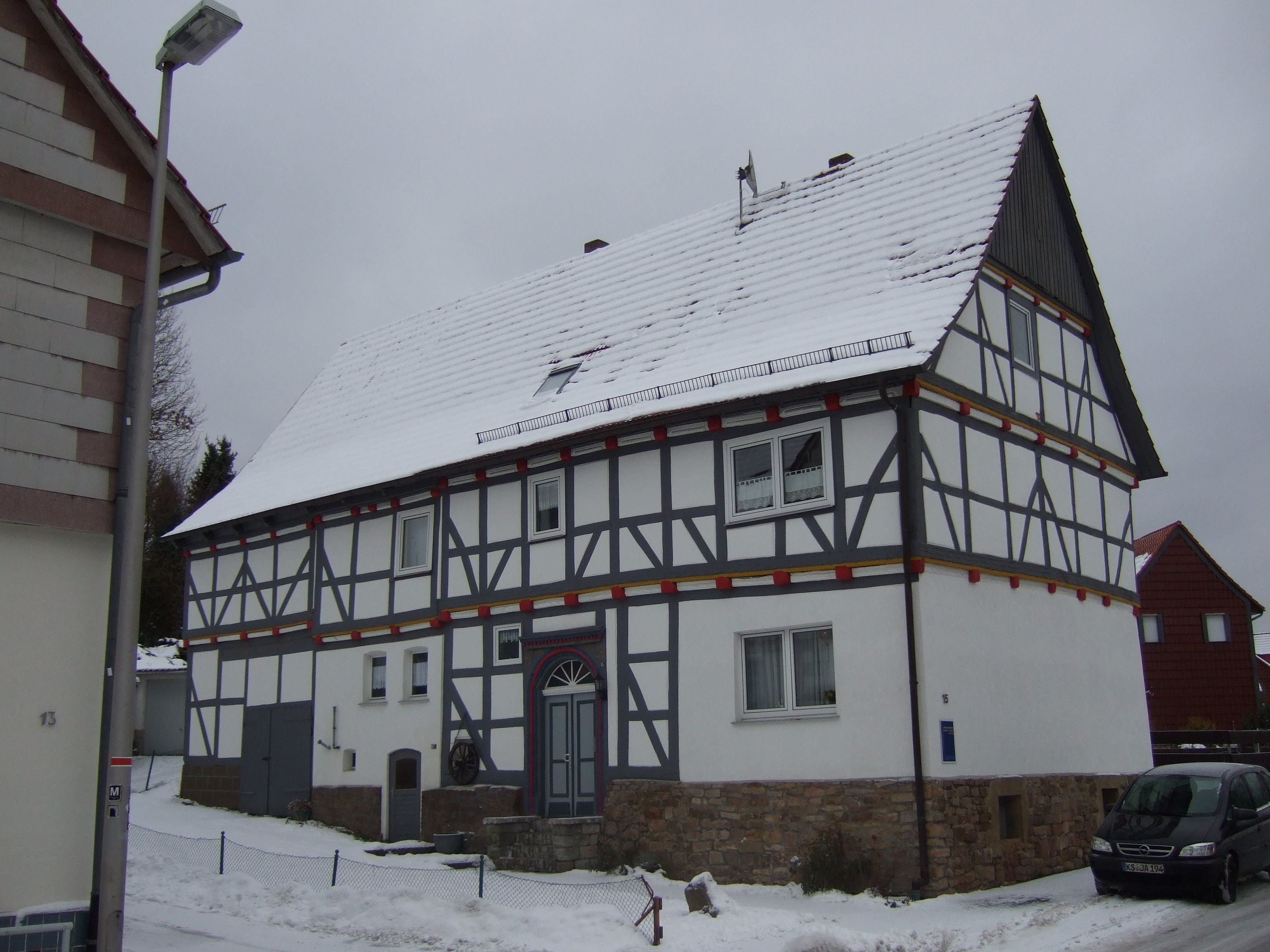 Eckhardsches Haus Söhrewald